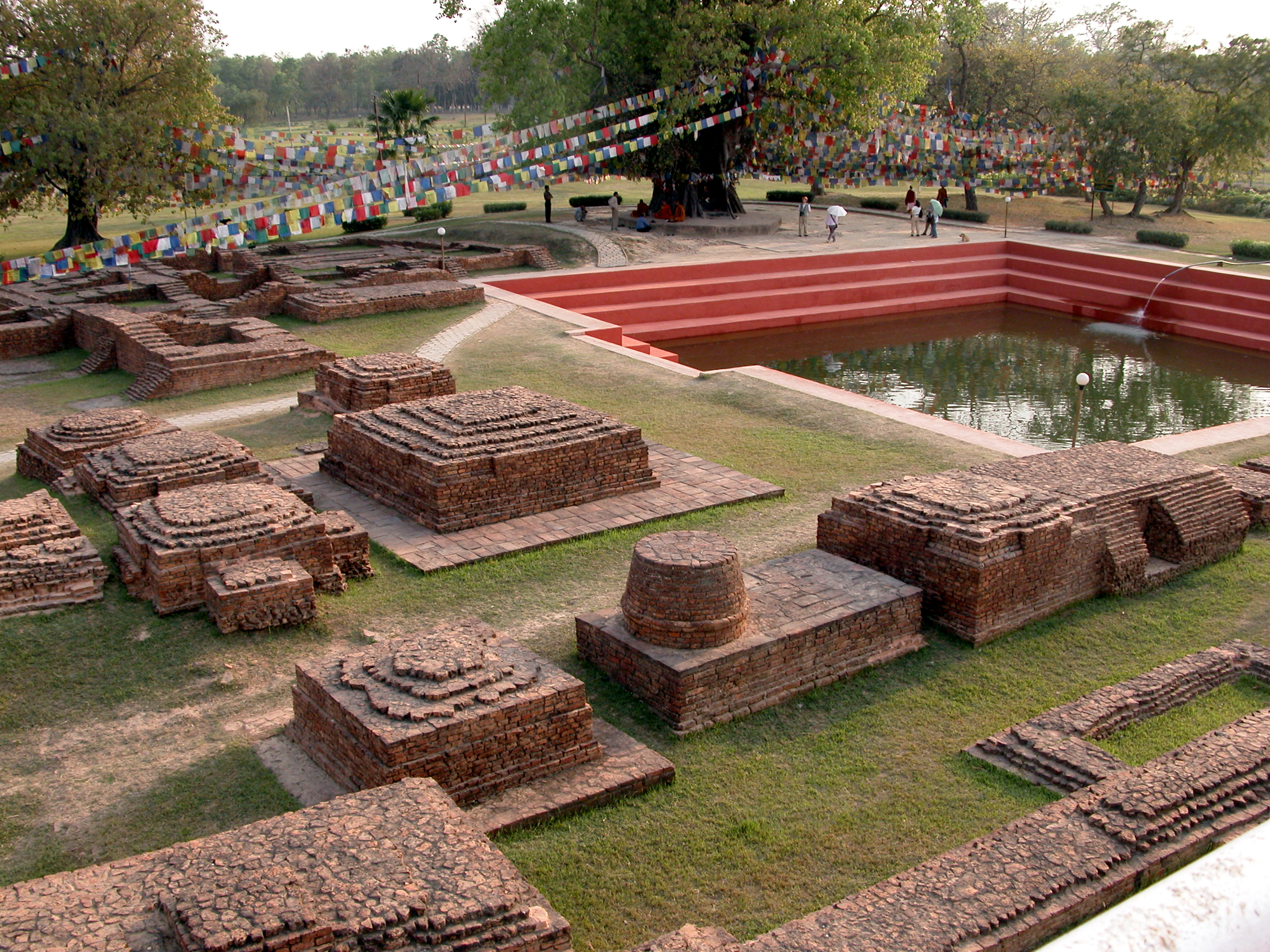 nepal, Lumbini le lieu de naissance de Bouddha